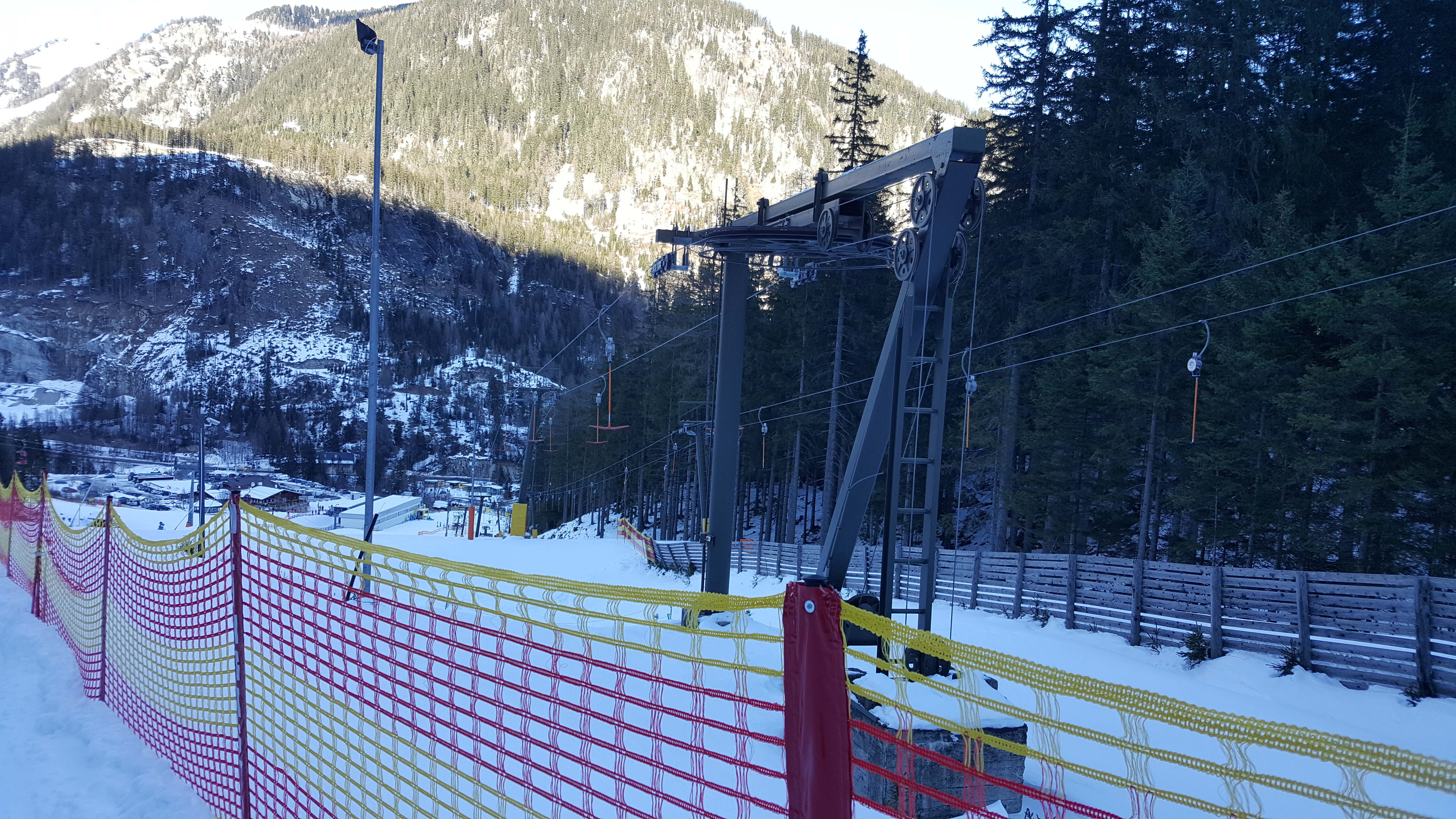 Der Übungslift Mauterndorf II ist eine klassische Schlepplift Anlage aus den 70ern